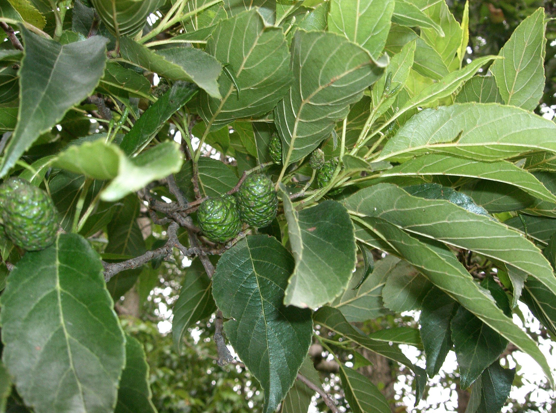 Scientific name Alnus japonica